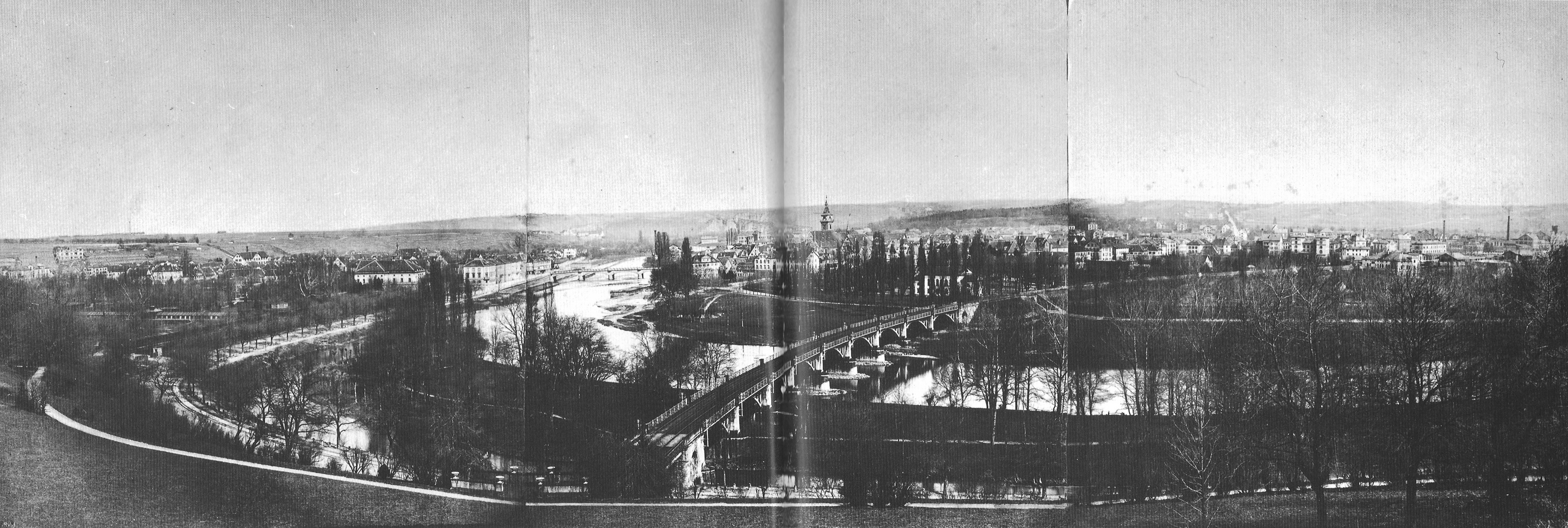 Panorama von Cannstatt, Albuminpapier-Abzug auf Karton, Maße: Bild 270 x 783 mm; ganz 385 x 920 mm